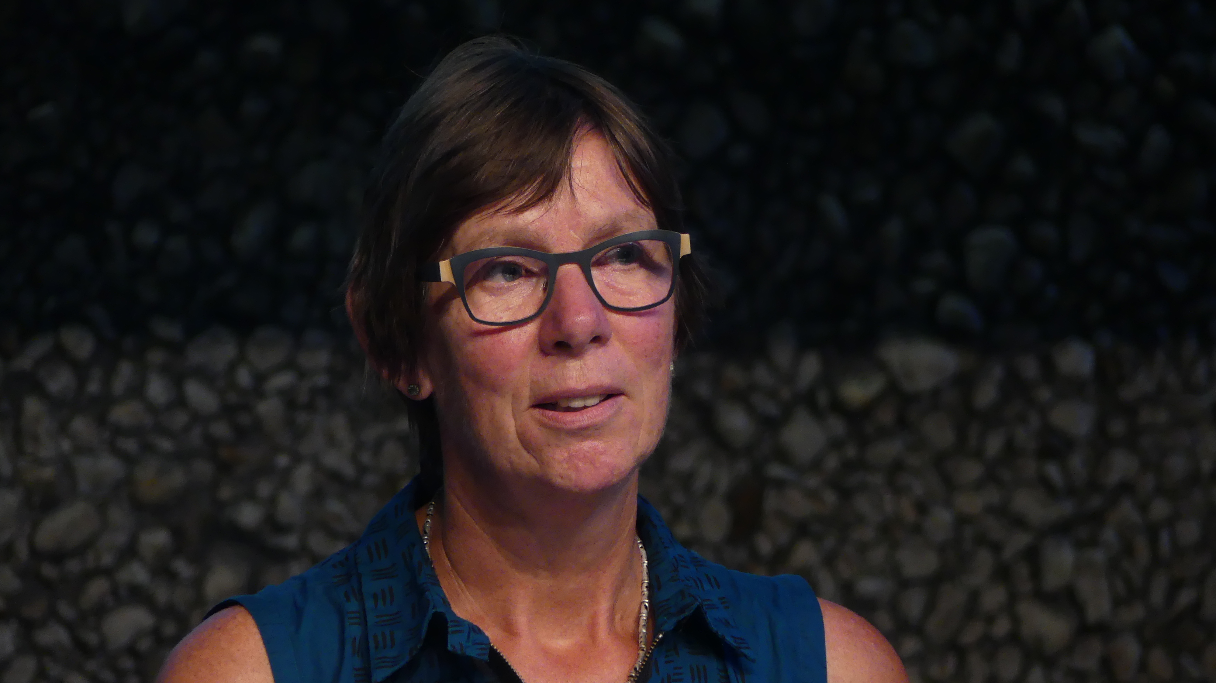 Bette Westera on September 13, 2016 at the Haus der Berliner Festspiele in Berlin during her participation at the section International Children´s and Young Adult Literature of the 16th International Literature Festival Berlin